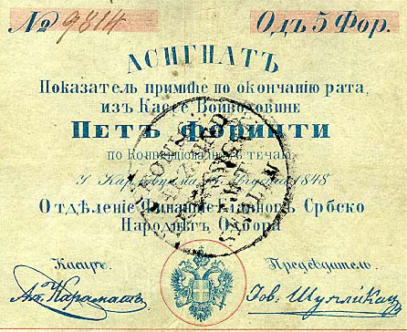 Асигнат из 1848. године. При дну асигната је грб Српске Војводине. У црвено оивиченом кругу је аустријски царски орао који на грудима носи штит са четири оцила.